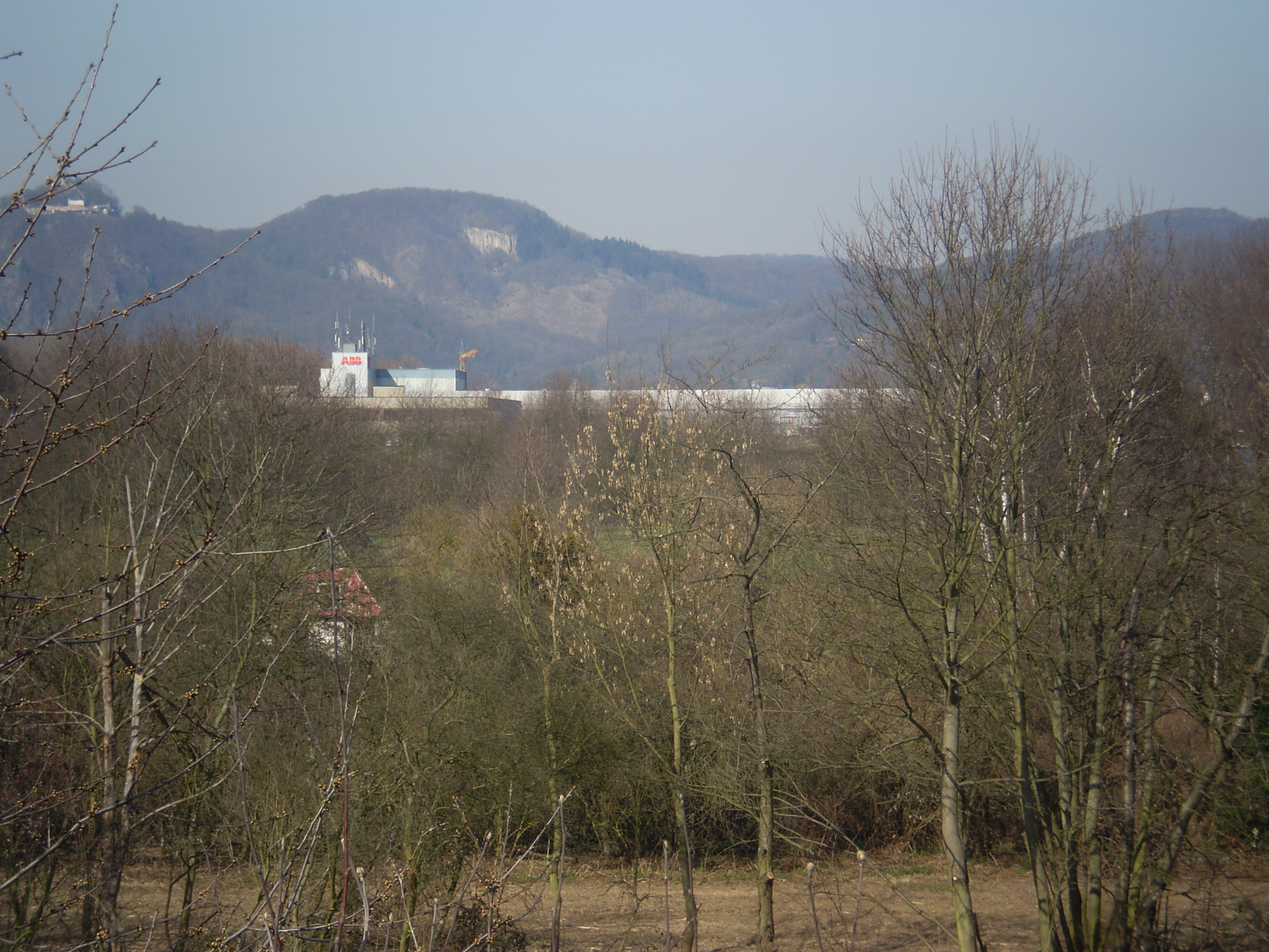 ABB im Bad Honnefer Lohfeld, im Hintergrund das Siebengebirge